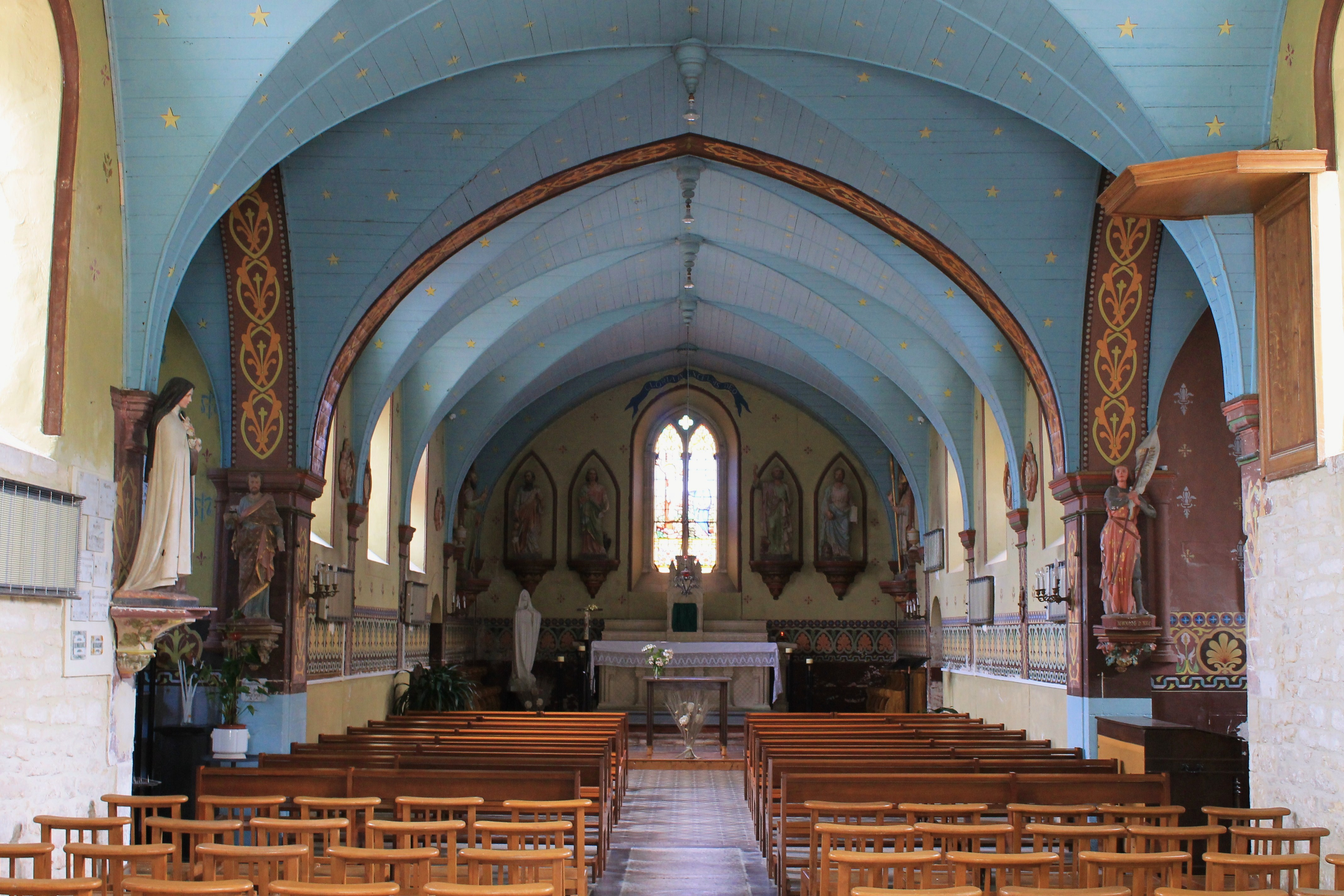 Nef de l'église Saint-Jacques de Cresserons (Calvados) Base Mémoire